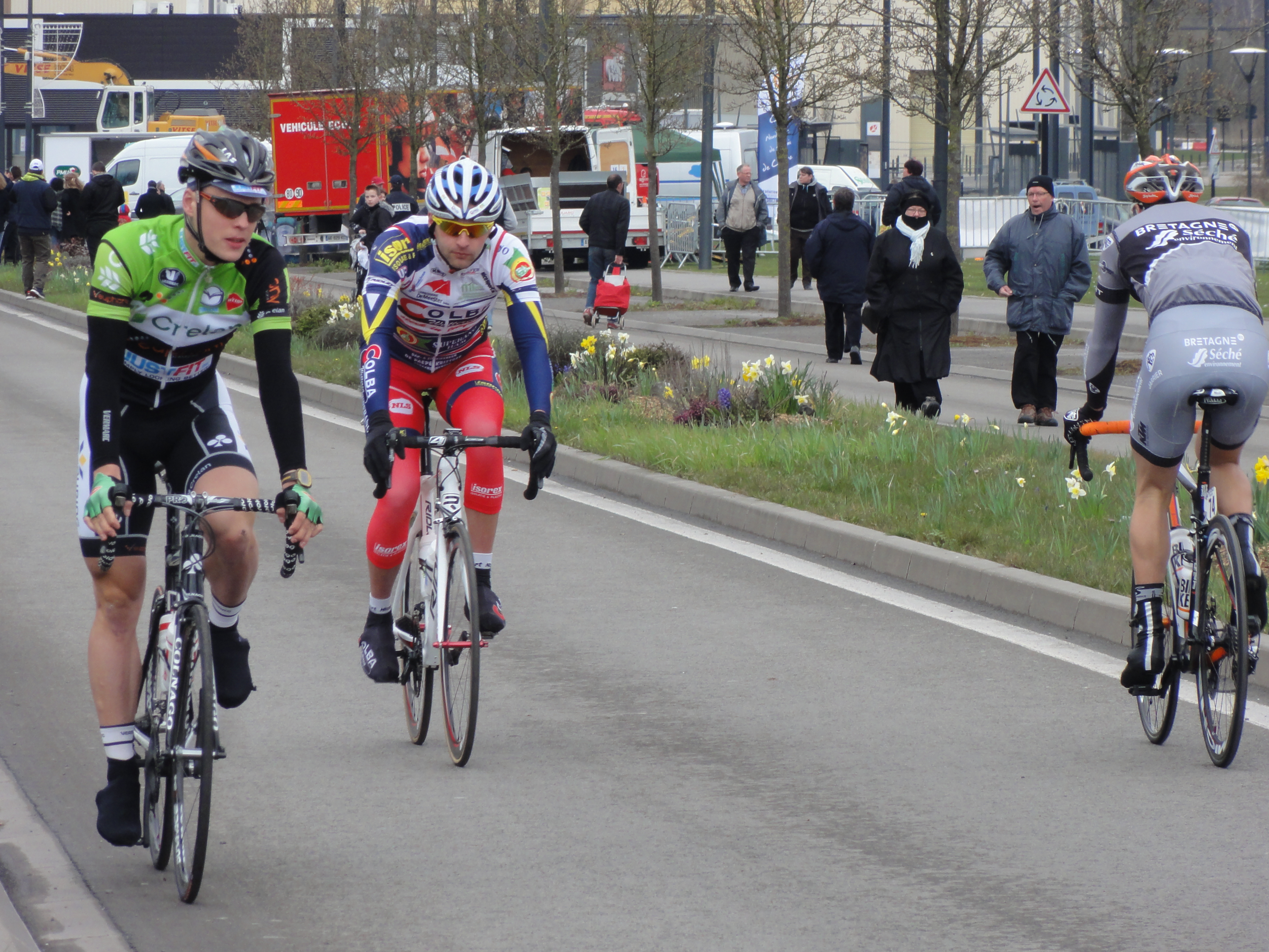 Reportage photographique réalisé le mardi 11 avril 2013 durant l'édition 2013 du Grand Prix de Denain à Denain, Nord, Nord-Pas-de-Calais, France. Depicted people: ...., Quentin Tanis and Benoît Jarrier